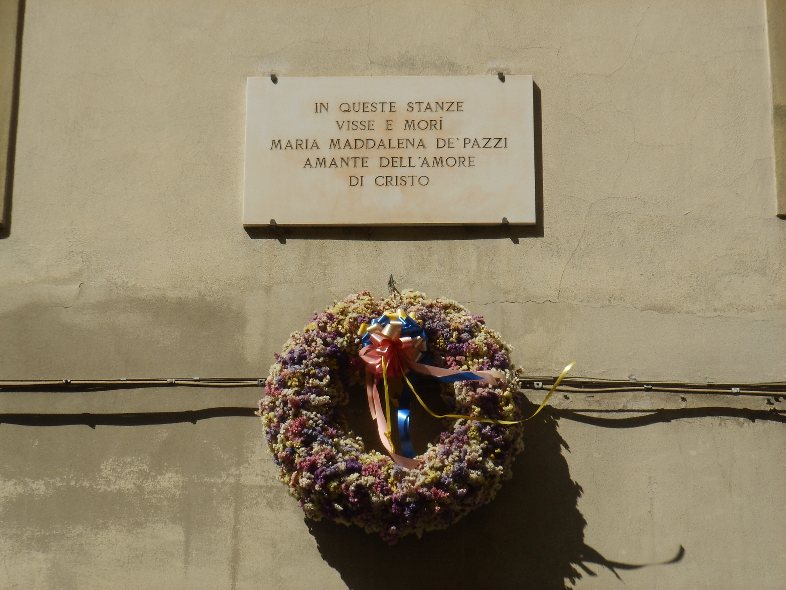 Santa Maria Mddalena de' Ricci, plaque, Florence, Italy